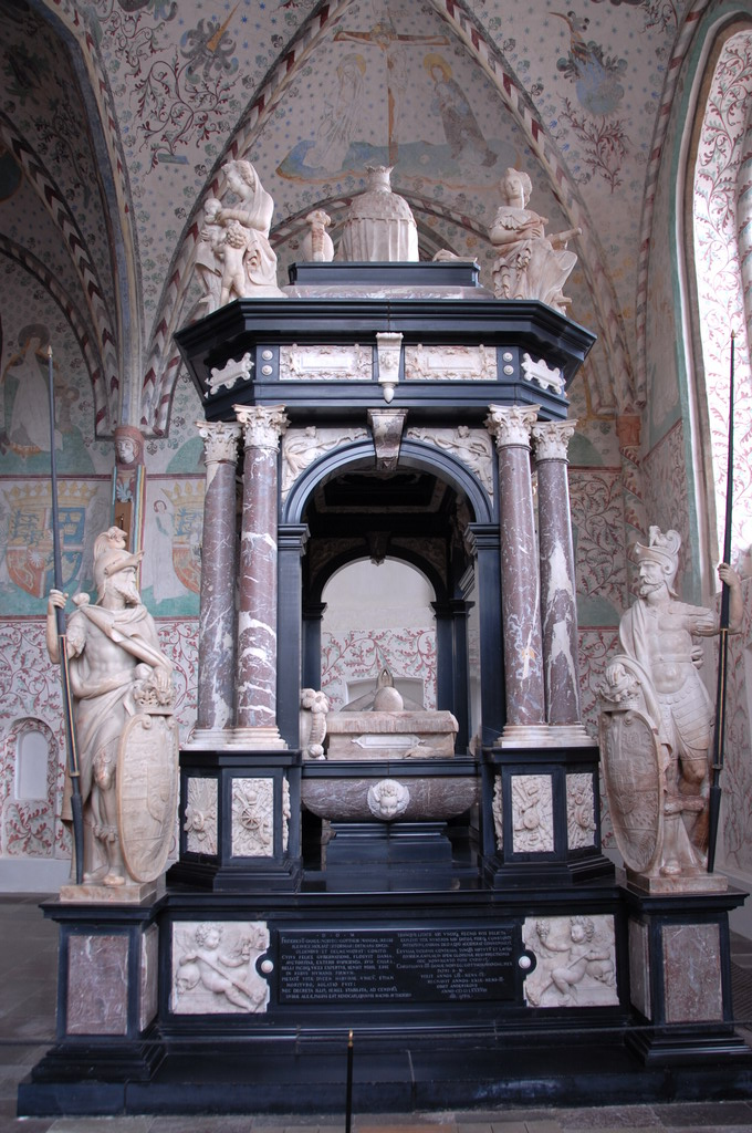 Rond 1460 voltooide kapel van Christian I. Dit gotische pantheon wordt gestut door een granieten zuil waarop 24 vorsten uit diverse landen hun lengte hebben laten aantekenen. De langste was tsaar Peter (208,4 cm), de kleinste Christian VII (164,1 cm). De graven zijn die van Christian III en Frederik II, beiden vergezeld van hun echtgenote Dorothea respectievelijk Sophie. Het monument voor Frederik en Sophie is van de Vlaamse kunstenaar Gert van Egen, die het meesterwerk van zijn landgenoot Floris vrijwel heeft gekopieerd (de heldendaden van de koning zijn in reliefs vereeuwigd).